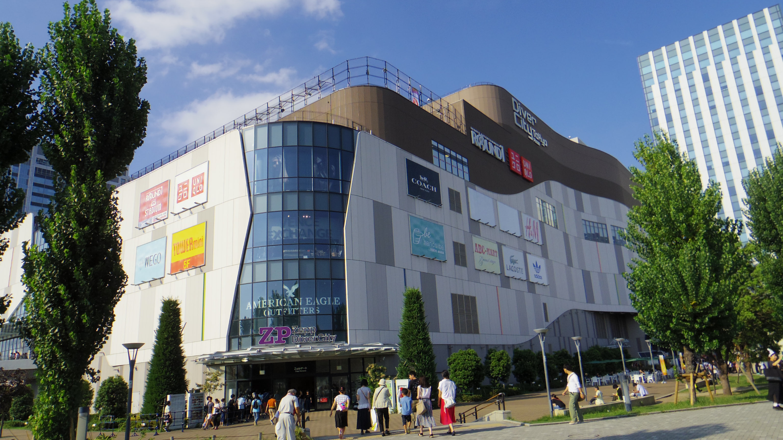 「ダイバーシティ東京」。2017年8月27日撮影。